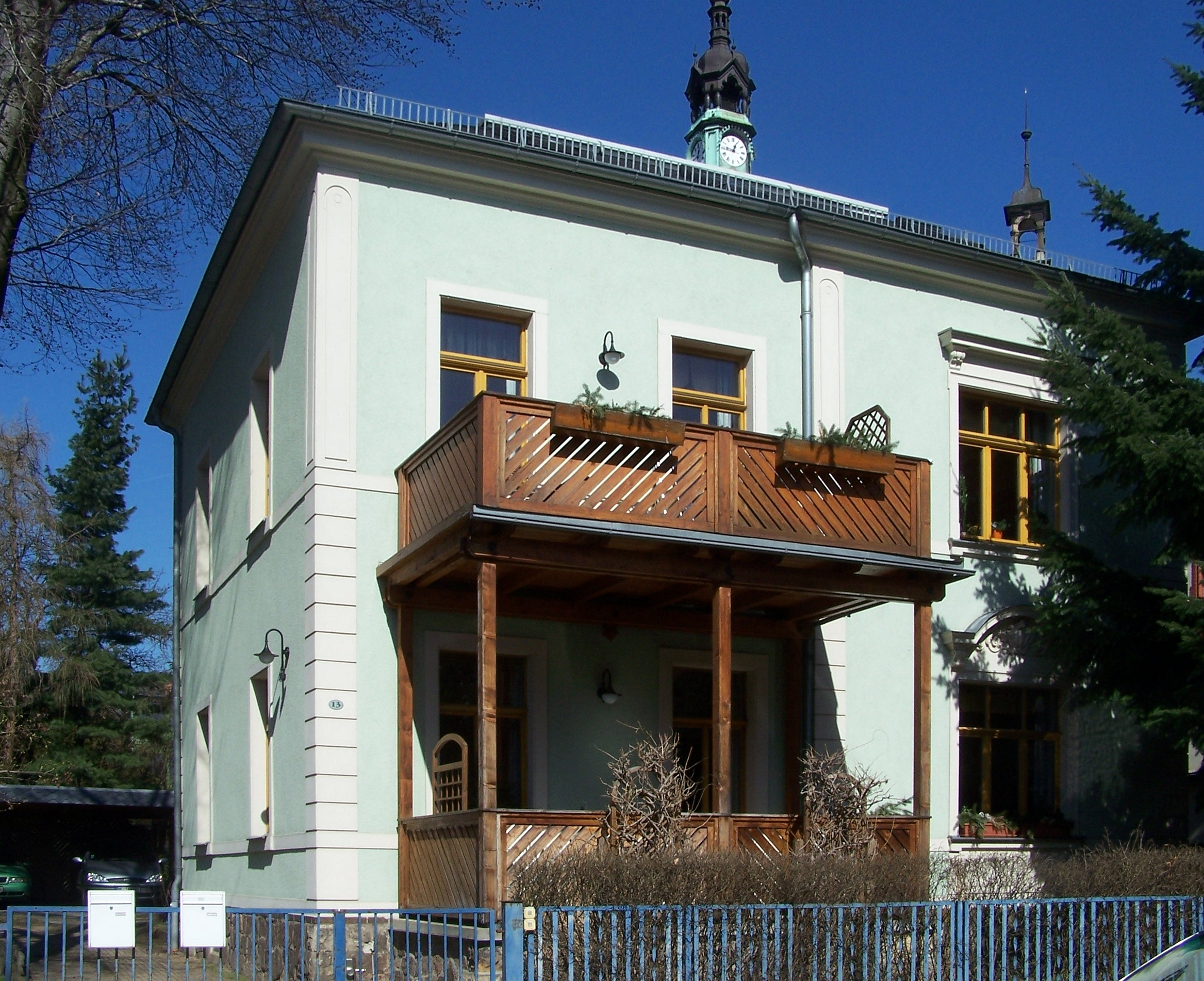 Karl-May-Str. 13 in Radebeul (die Türmchen gehören zur dahinterliegenden Lutherkirche)